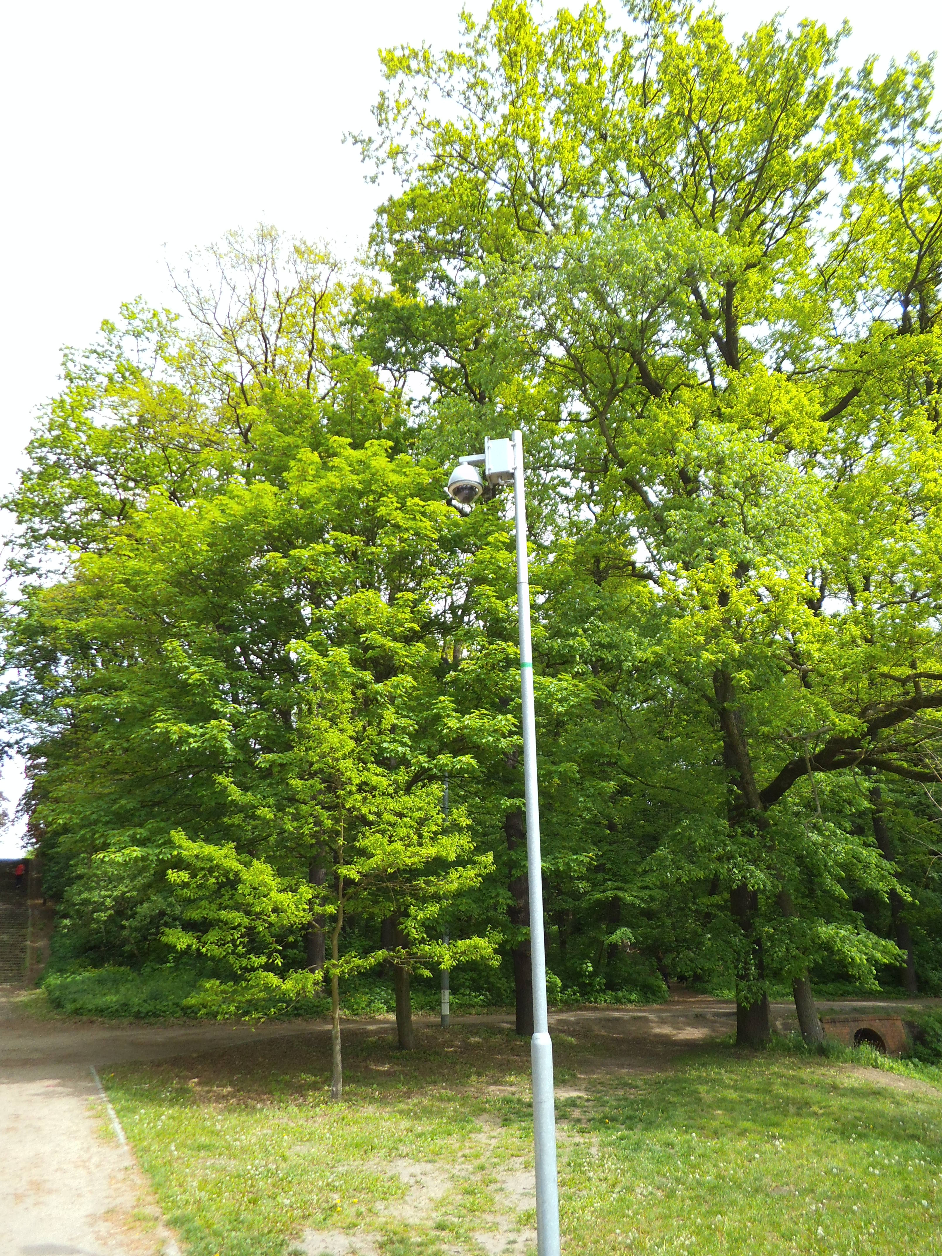 Monitoring miejski w Toruniu